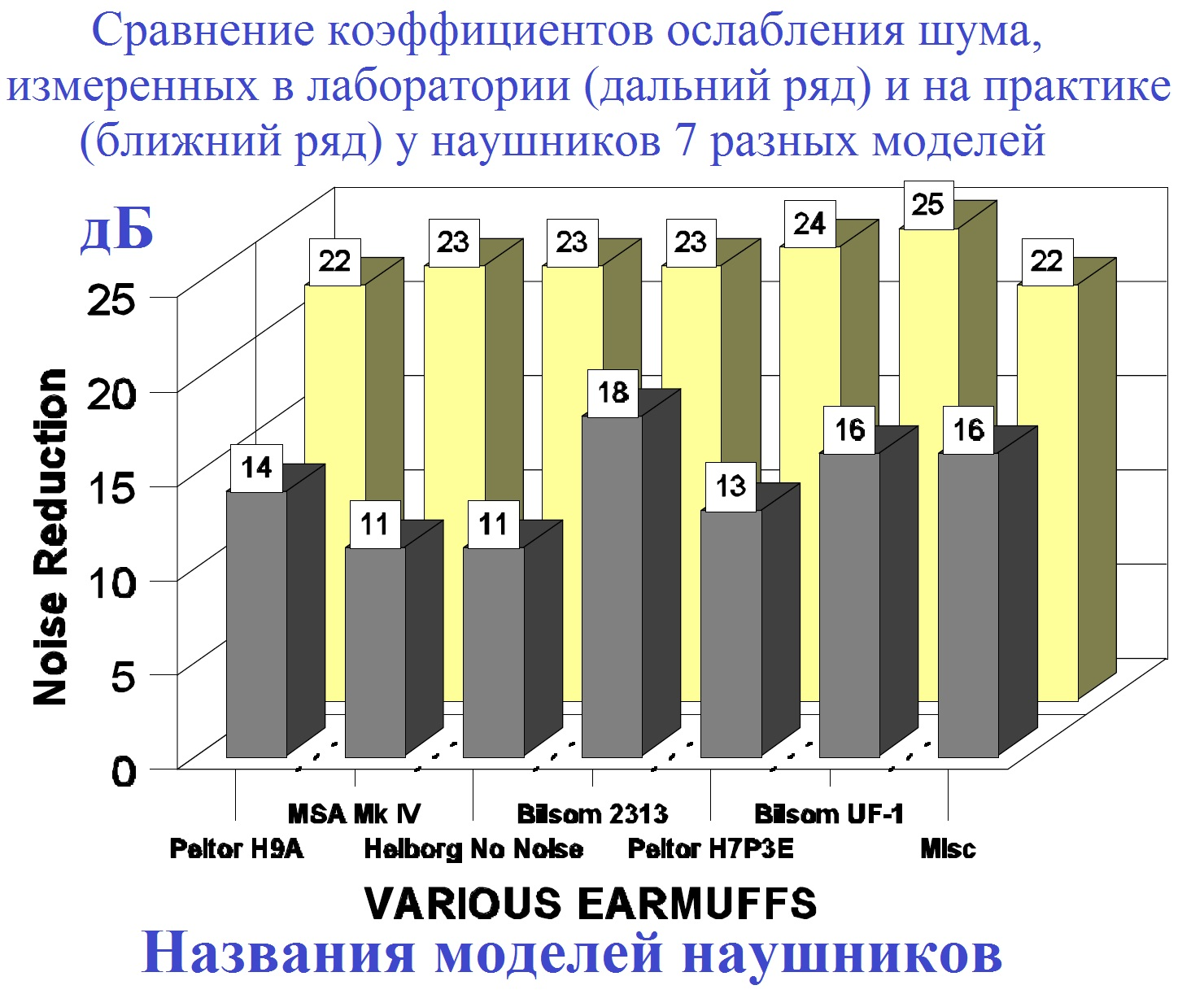 Диаграмма показывает низкую эффективность противошумных наушников при их использовании на практике - по сравнению с лабораторной эффективностью. Приводятся сведения о вкладышах семи различных конструкций.